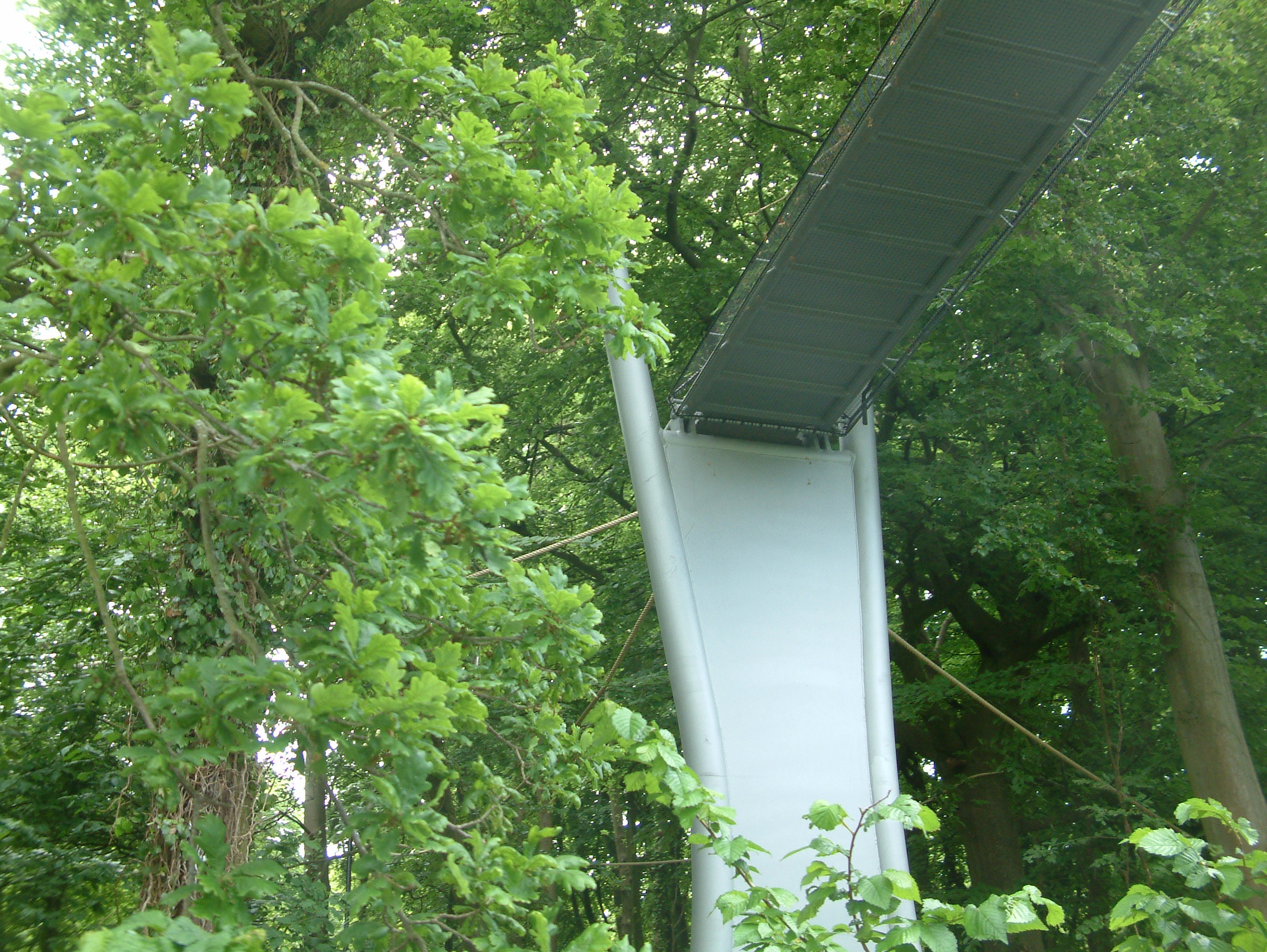 Bridges in The Hague as mentioned in the filename.